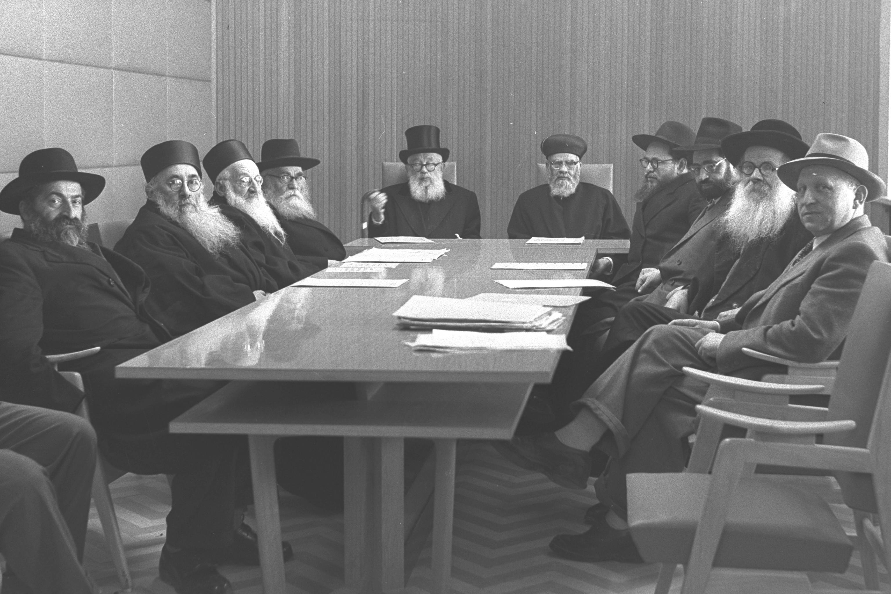 ישיבת מועצת הרבנות הראשית בהיכל שלמה בירושלים. יושבים בראש, הרב יצחק הלוי הרצוג והרב יצחק ניסים